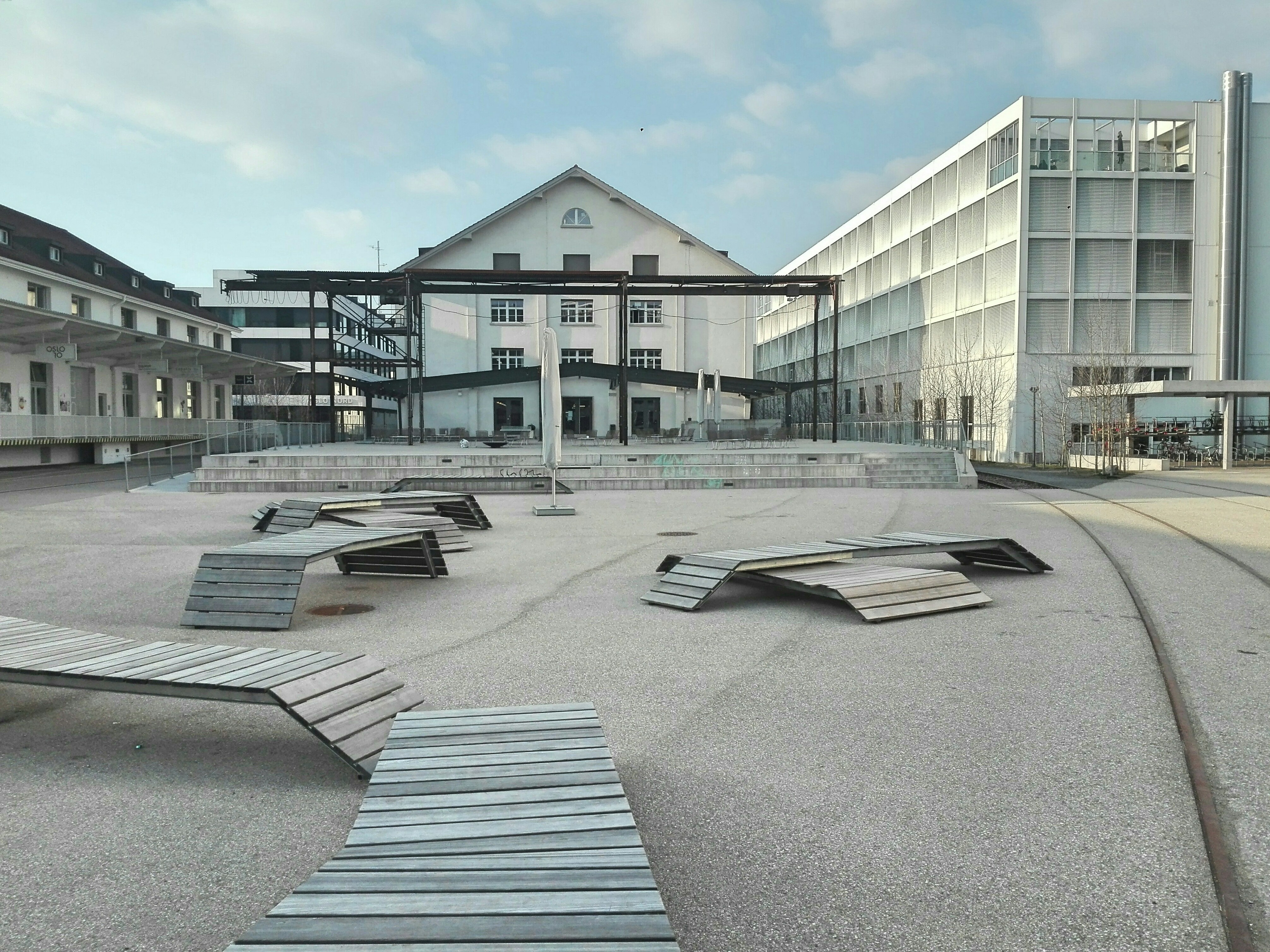 Dreispitzplatz in Basel